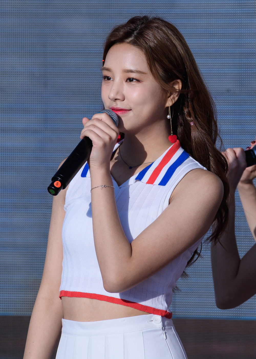 170611 라붐 수원 세계문화축제